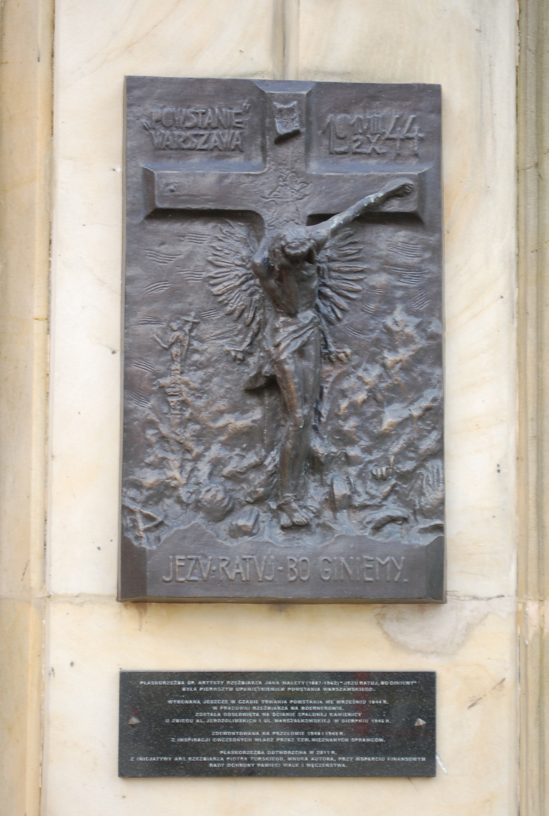 Gedenk Marszalkowska Jerozolimskie